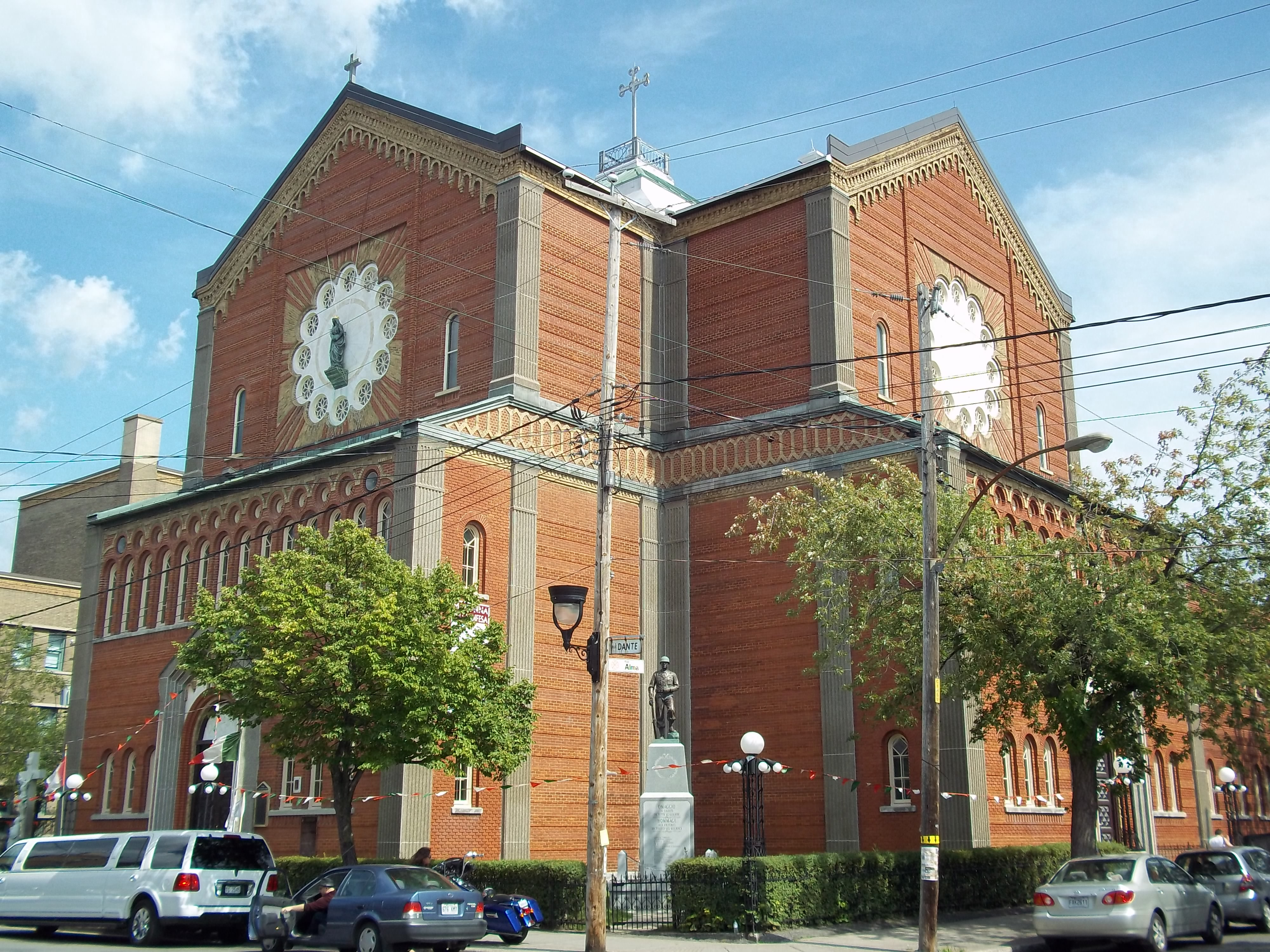 Église Notre-Dame-de-la-Défense à Montréal, 6800, avenue Henri-Julien, dans le quartier Petite Italie. Grand Répertoire du patrimoine bâti de Montréal : Église Notre-Dame-de-la-Défense